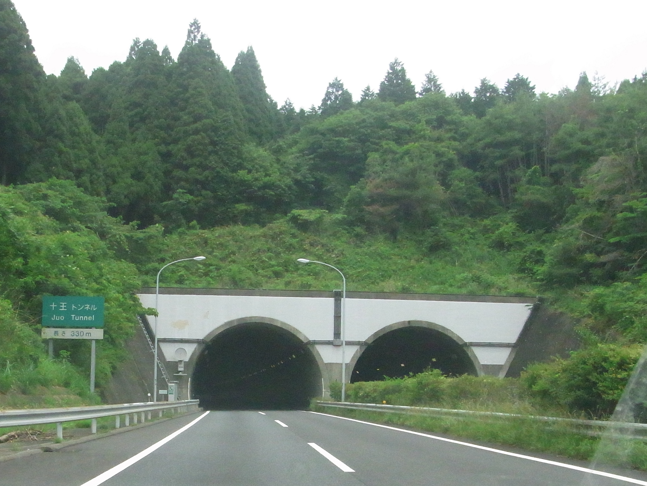 十王トンネル (下り線より撮影)